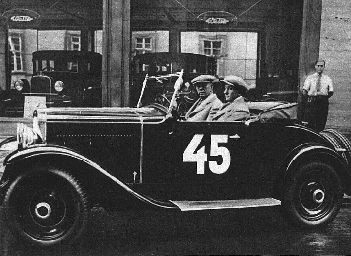 Velké Mezinárodní Alpské jízdy spolehlivosti se ve dnech 30.7.-6.8.1931 zúčastnila posádka G. Čáslavký a V. Kumpera st. na lidovém vozu Walter Bijou. Snímek zachycuje odjezd posádky k soutěži od pražské prodejny Walter v Platnéřské ulici